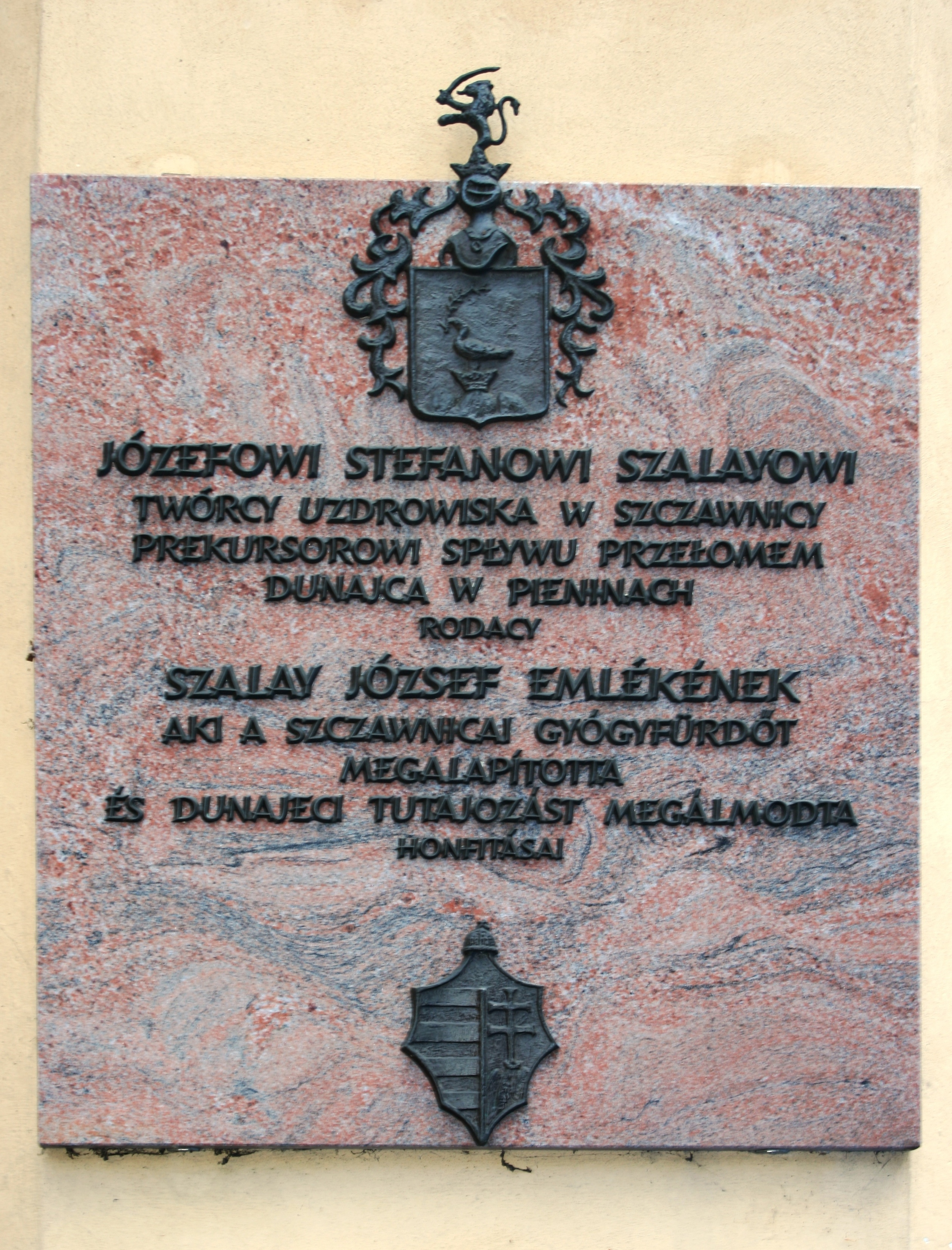 Tablica poświęcona Szalayowi na kapicy przy starym cmentarzu przy ul. Głównej w Szczawnicy